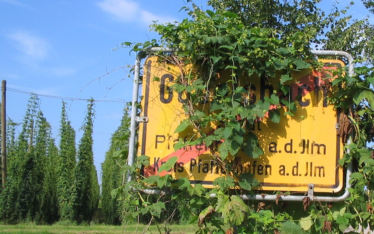 Ortsschild von Göbelsbach (Pfaffenhofen an der Ilm) mit Hopfen (Humulus lupulus)